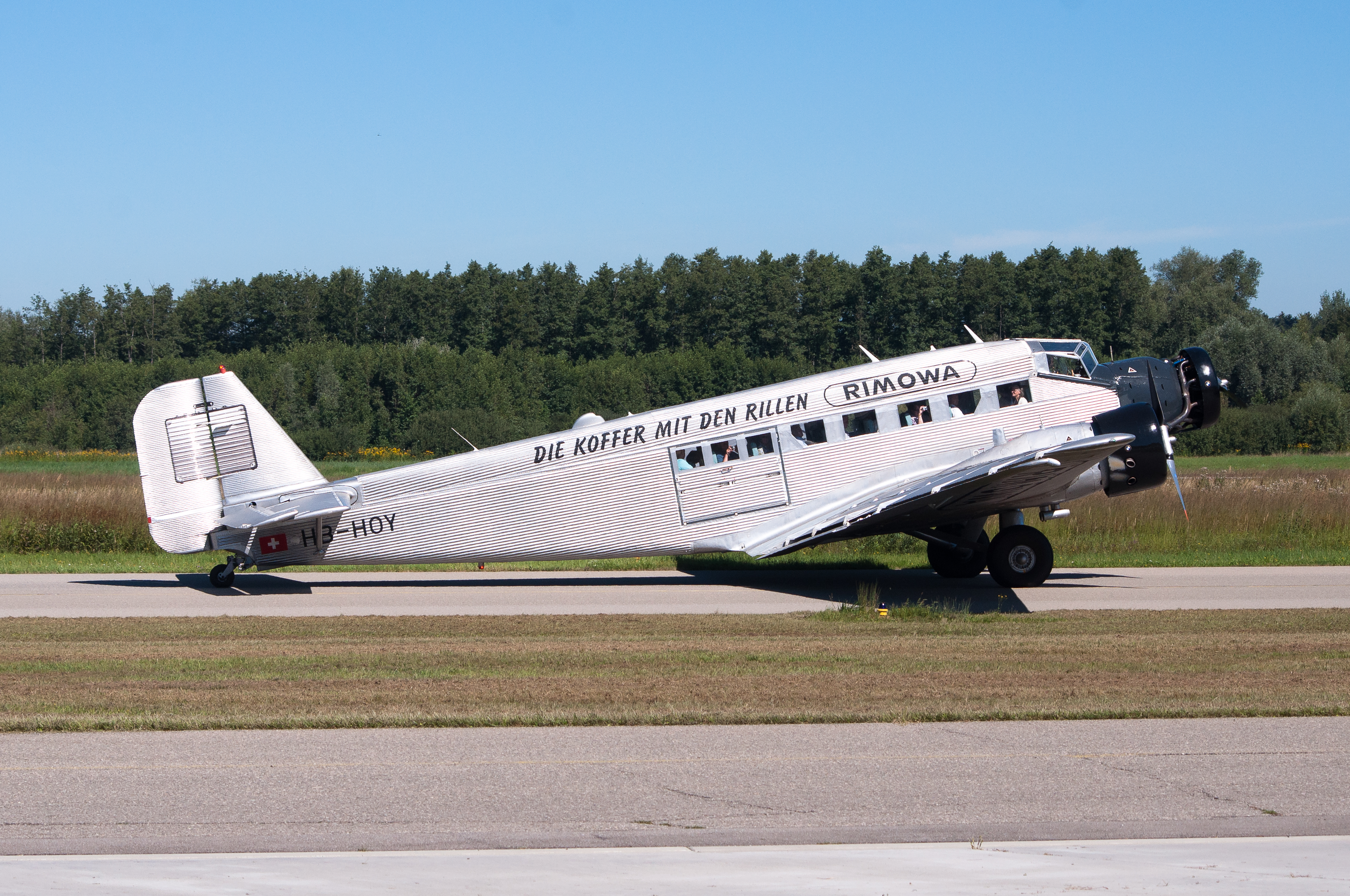 JU-52 during the Do Days at Friedrichshafen